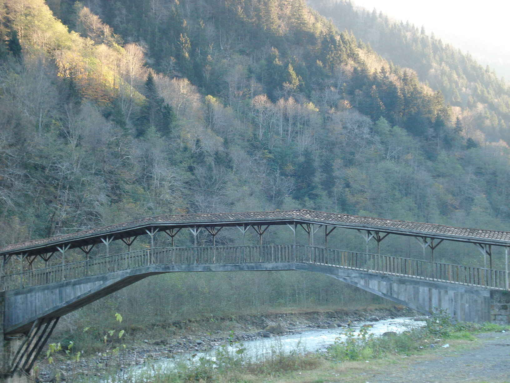 Trabzon'da bulunan Hapsiyaş Köprüsü.